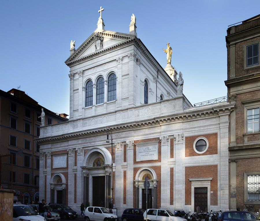 Basilica del Sacro Cuore di Gesù a Roma